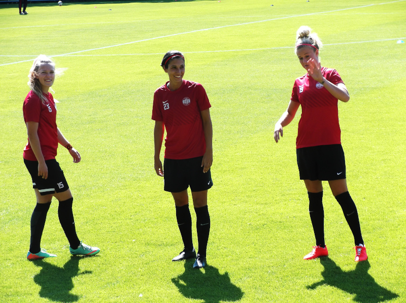 Sara Doorsoun avec deux joueuses du SGS Essen, dont Margarita Gidion, le 22 août 2015 à l'Académie Robert Louis-Dreyfus lors d'un match contre le Standard